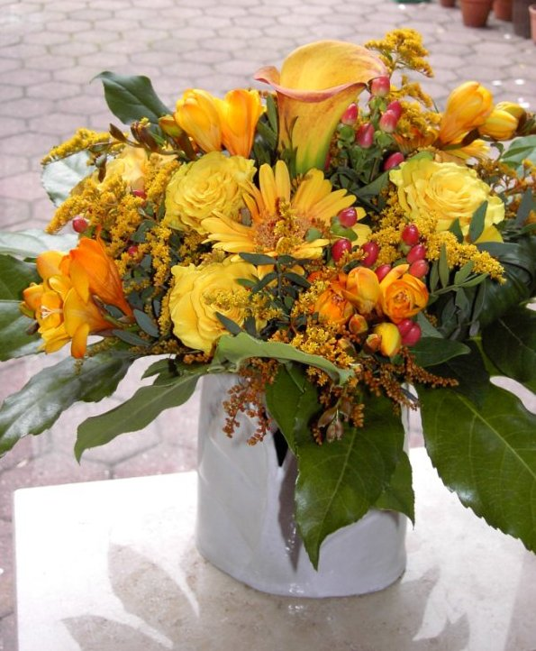 Ein Blumenstrauß in einer Vase